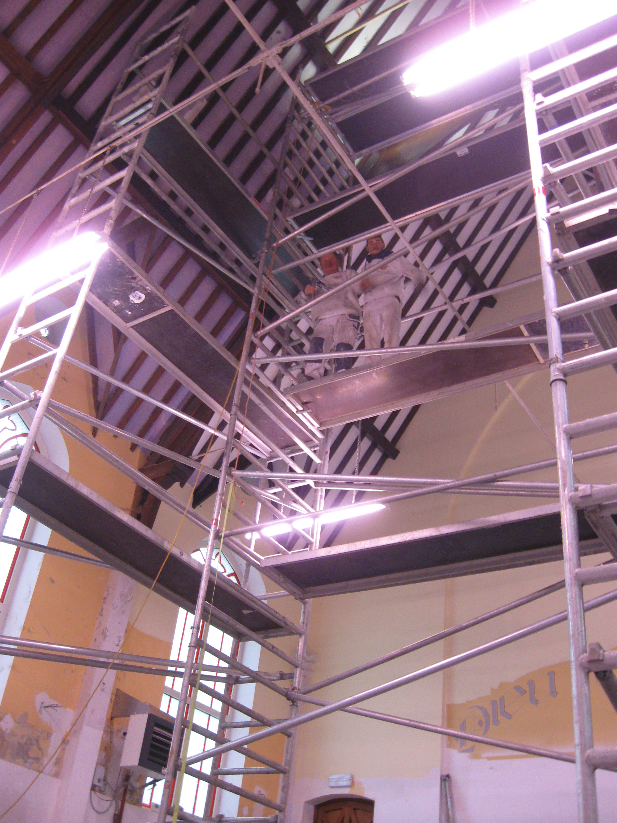 Echafaudage dressé dans le temple pendant le traitement de la charpente et la peinture du plafond en blanc (3 décembre 2014)